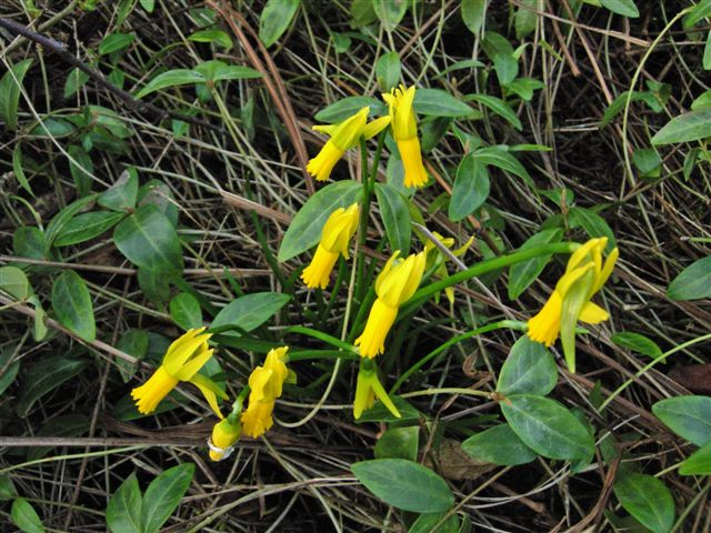 Narcissus cyclamineus en culture